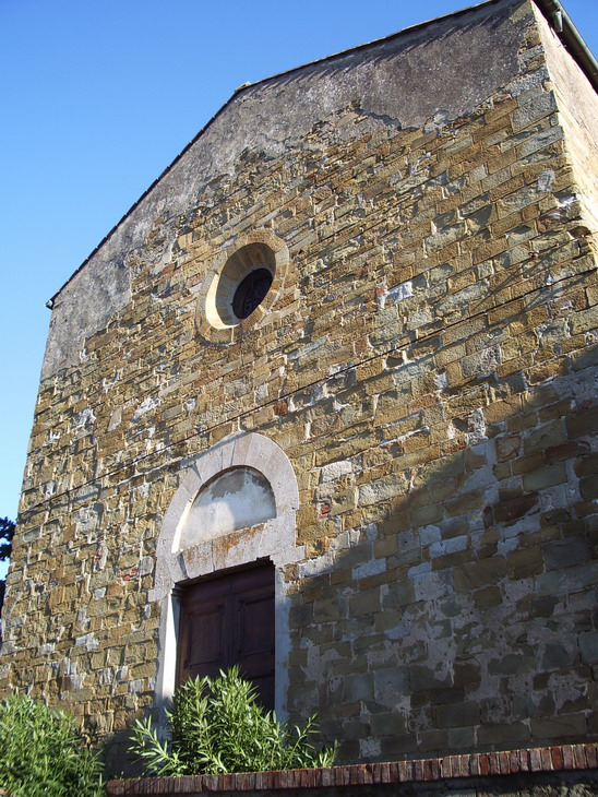 La facciata anteriore del Convento di San Donato a Scarlino